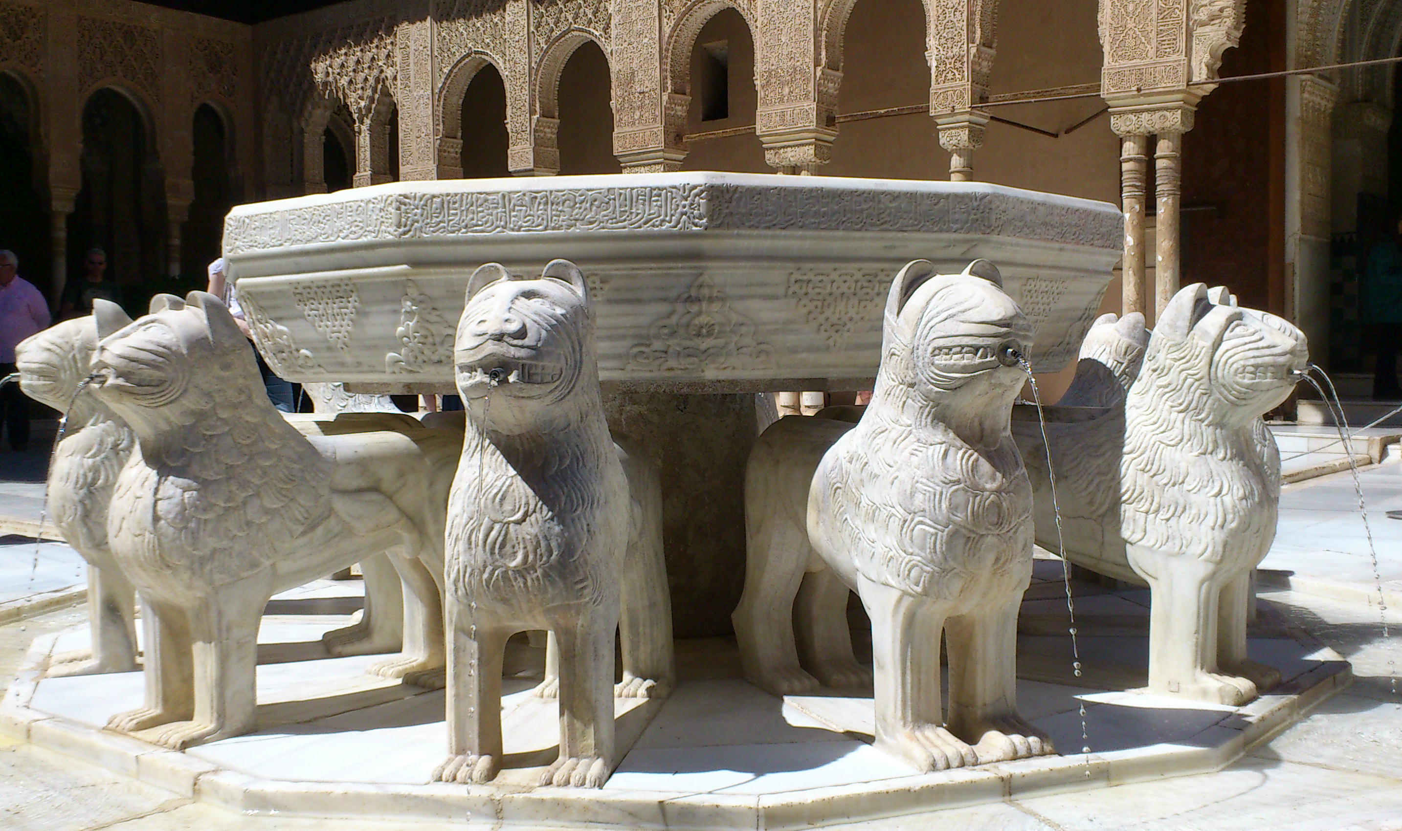 Fuente de los Leones con los leones restaurados. En los palacios nazaríes de La Alhambra de Granada.